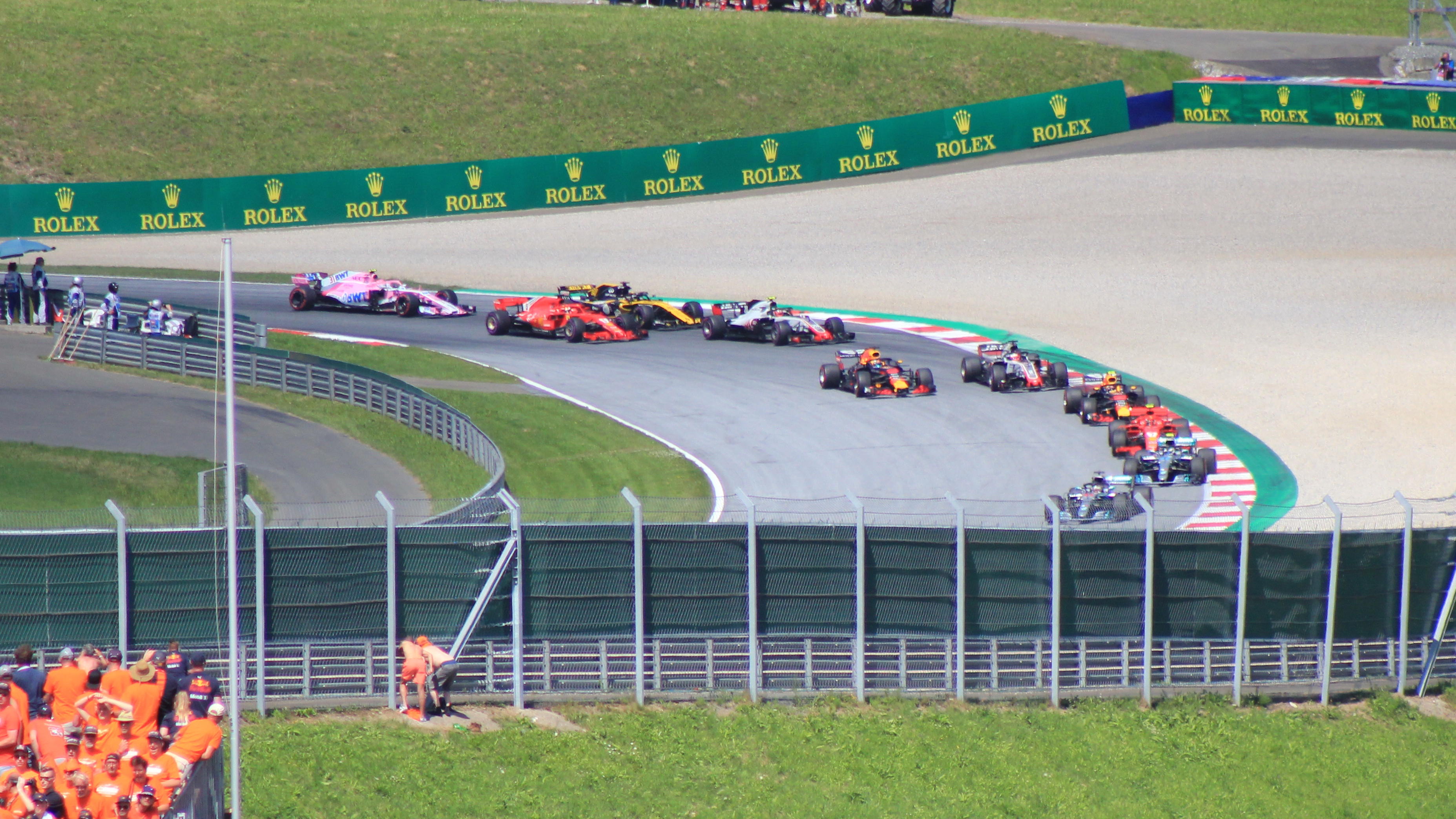 Szenen vom Rennen (Einführungsrunde Kurve 3)